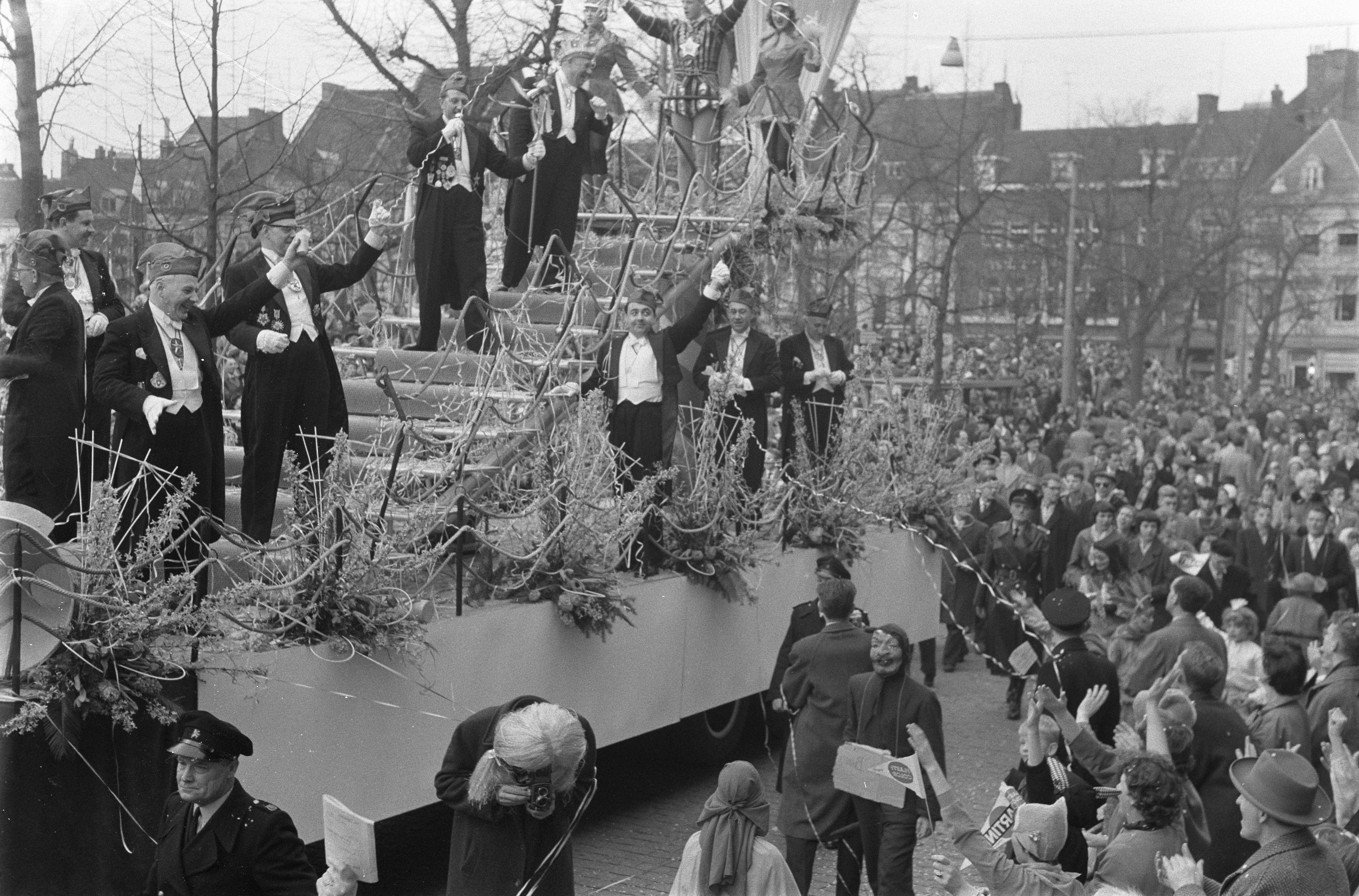 Collectie / Archief : Fotocollectie Anefo Reportage / Serie : [ onbekend ] Beschrijving : Carnavalsoptocht in Maastricht Datum : 28 februari 1960 Locatie : Maastricht Trefwoorden : Carnavalsoptochten Fotograaf : Pot, Harry / Anefo Auteursrechthebbende : Nationaal Archief Materiaalsoort : Negatief (zwart/wit) Nummer archiefinventaris : bekijk toegang 2.24.01.05 Bestanddeelnummer : 911-0556